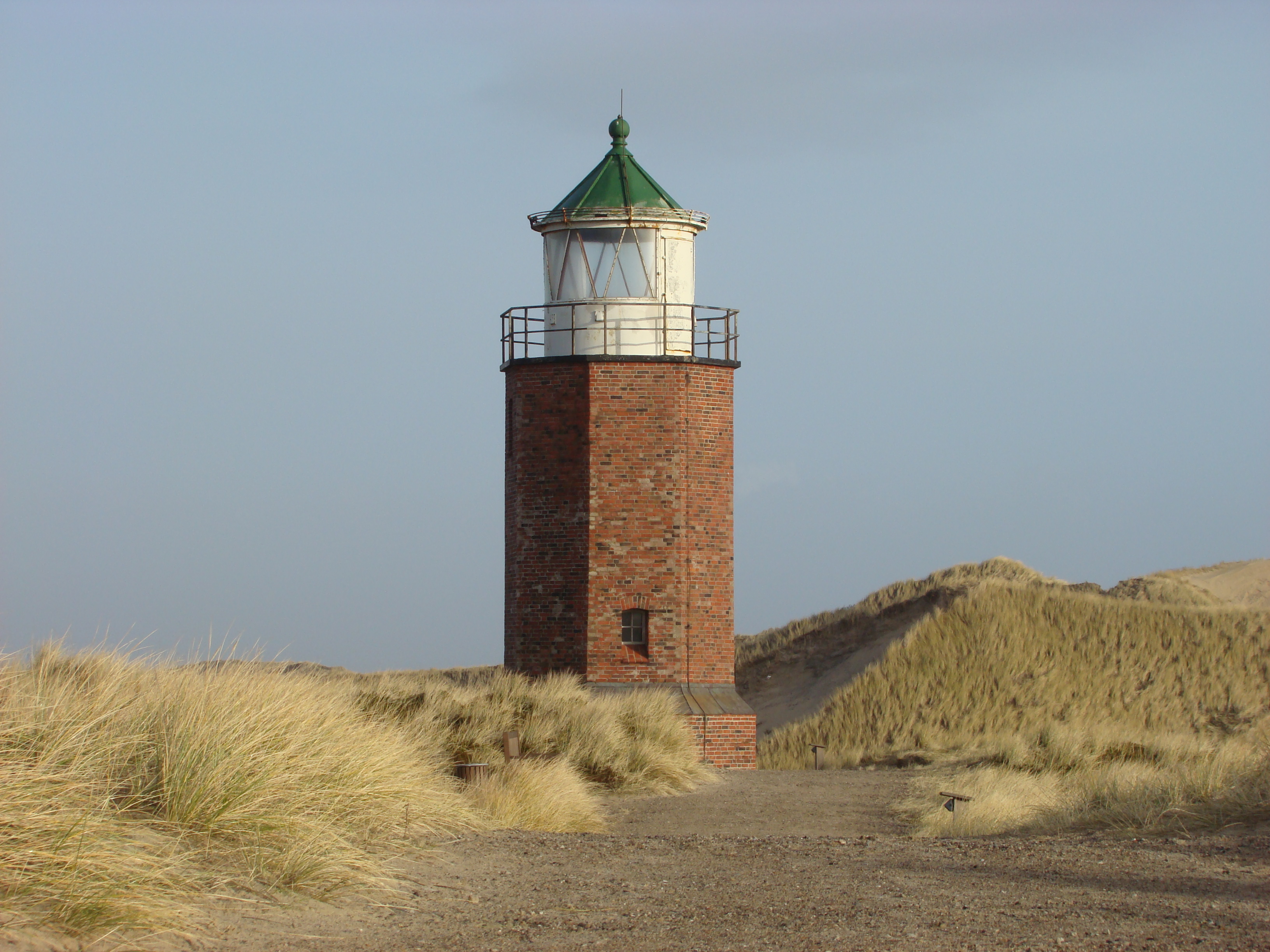 Ursprgl.Quermarkenfeuer "Rote Kliff"